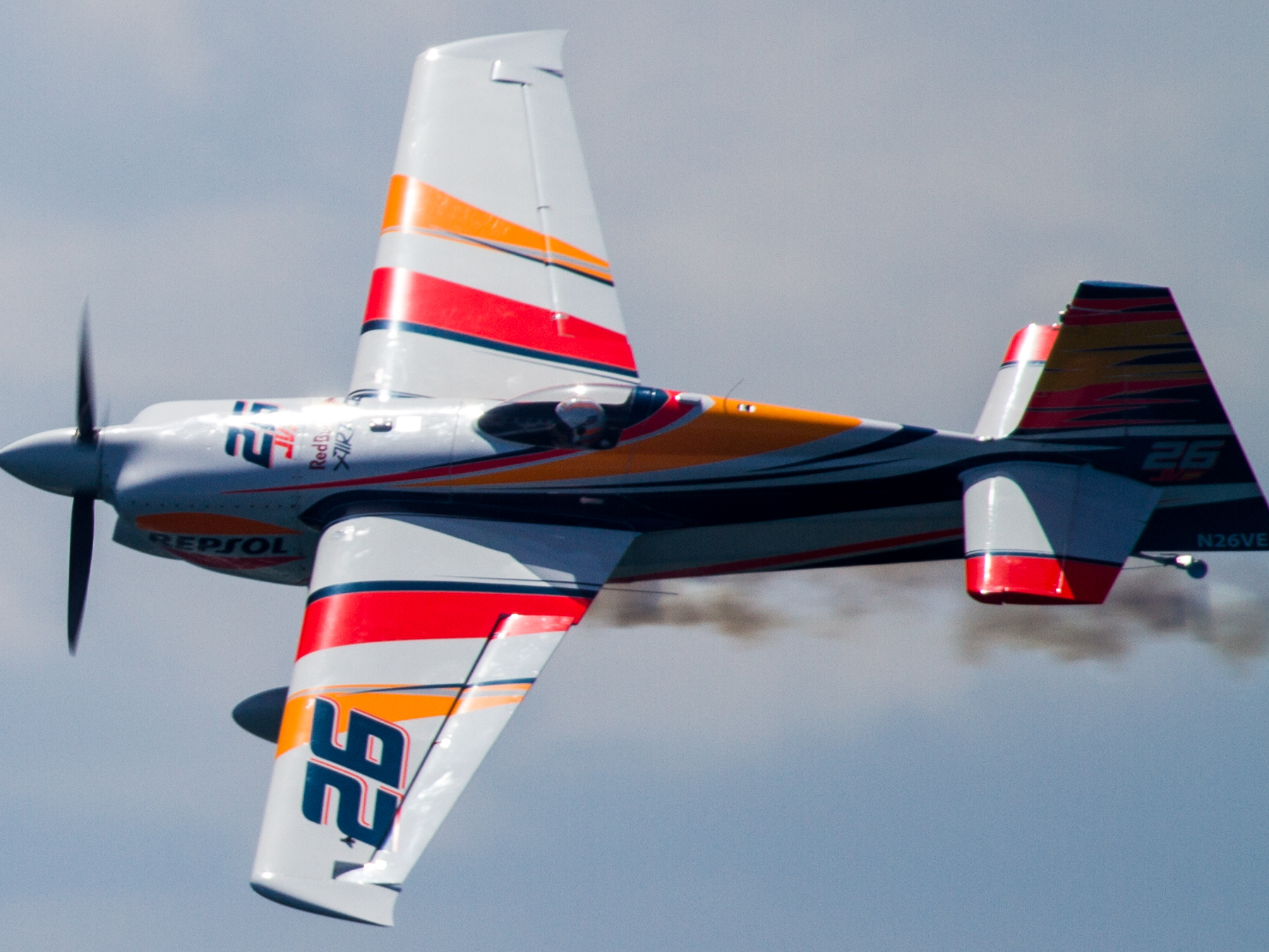 2017年レッドブル・エアレース・ワールドシリーズ 千葉 フアン・ベラルデ（スペイン）の機体